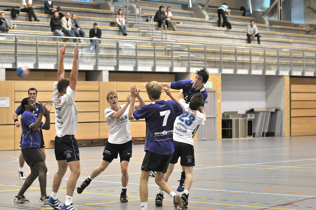 Oefenwedstrijd Gemini Zoetermeer (in het blauw) tegen Hercules uit Rijswijk. De testmatch eindigde in 25-20 voor de heren van Gemini 1.